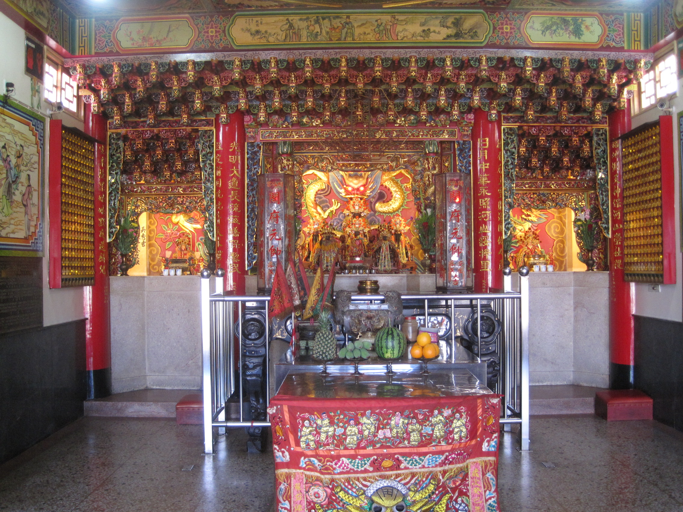 六甲頂開仙宮正殿